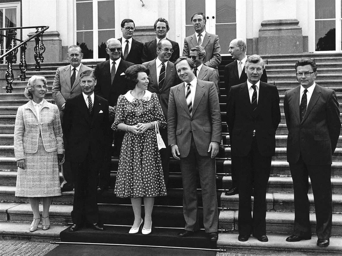 Kabinet-Van Agt III